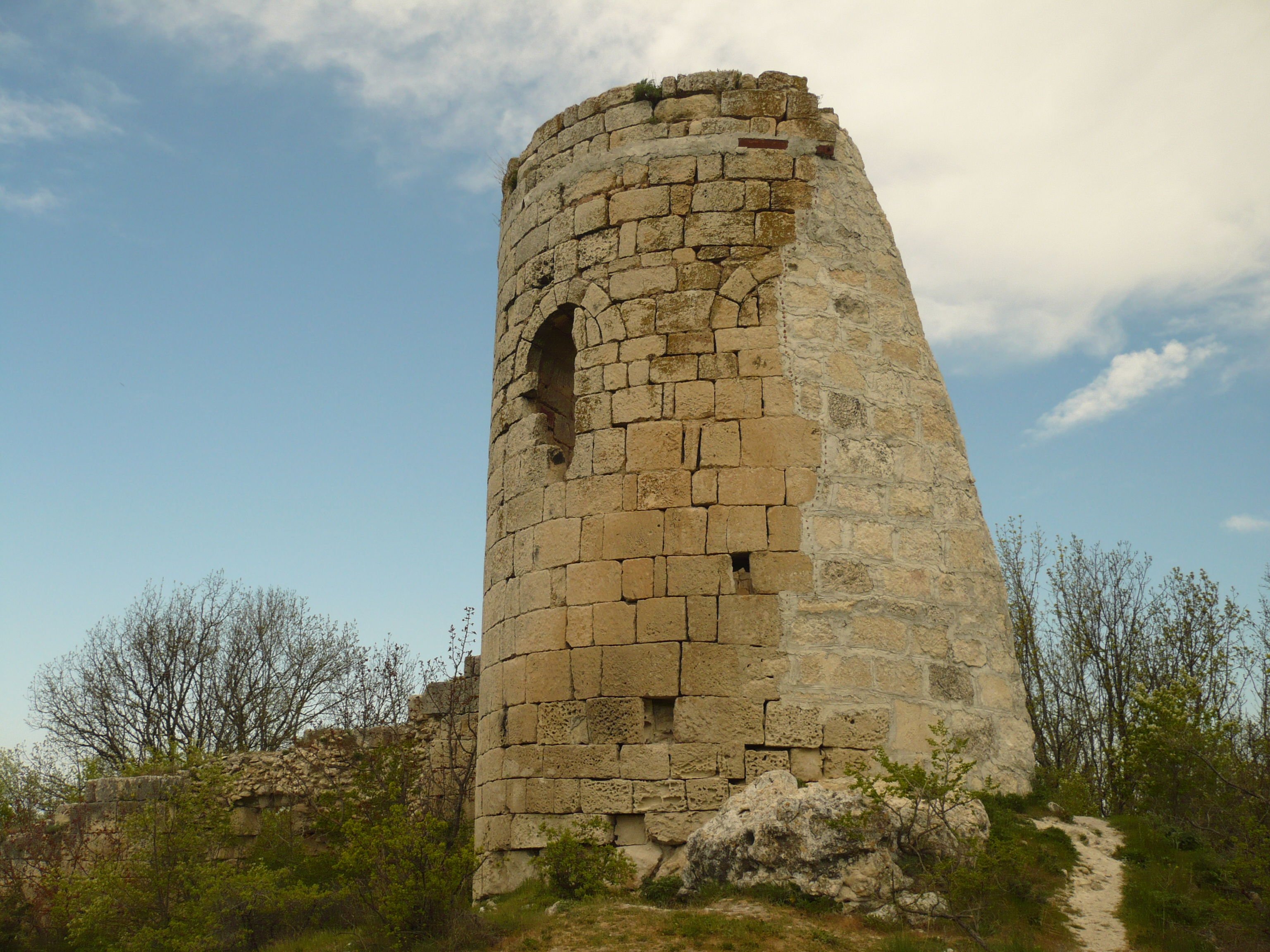 Сюйреньська фортеця (фортеця біля села Сюйрень. З тюрк. Сюйрень – місце проведення кінних перегонів під час свят).